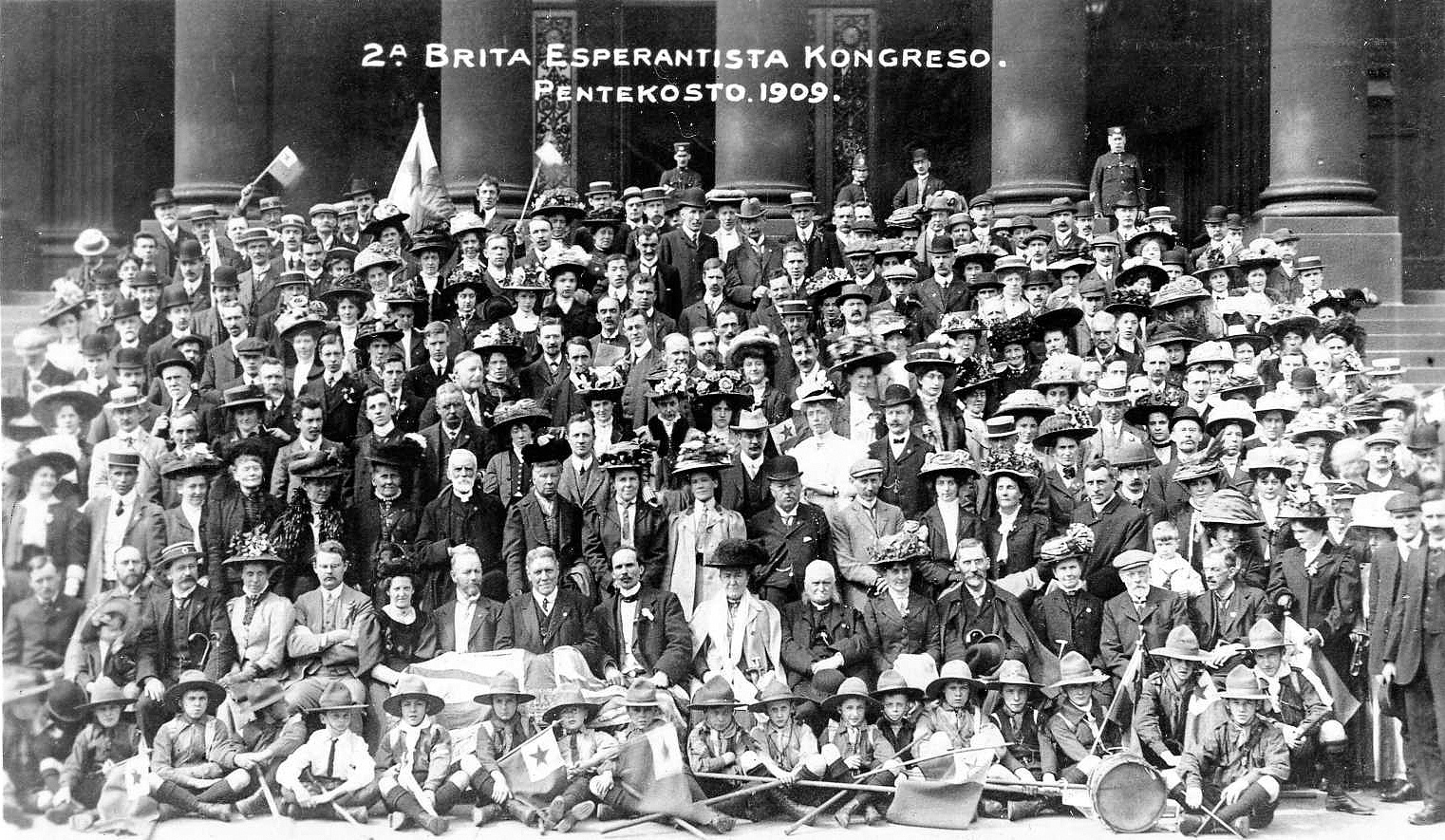 Komuna foto de la 2-a Brita Kongreso de Esperanto en Leeds, 1909